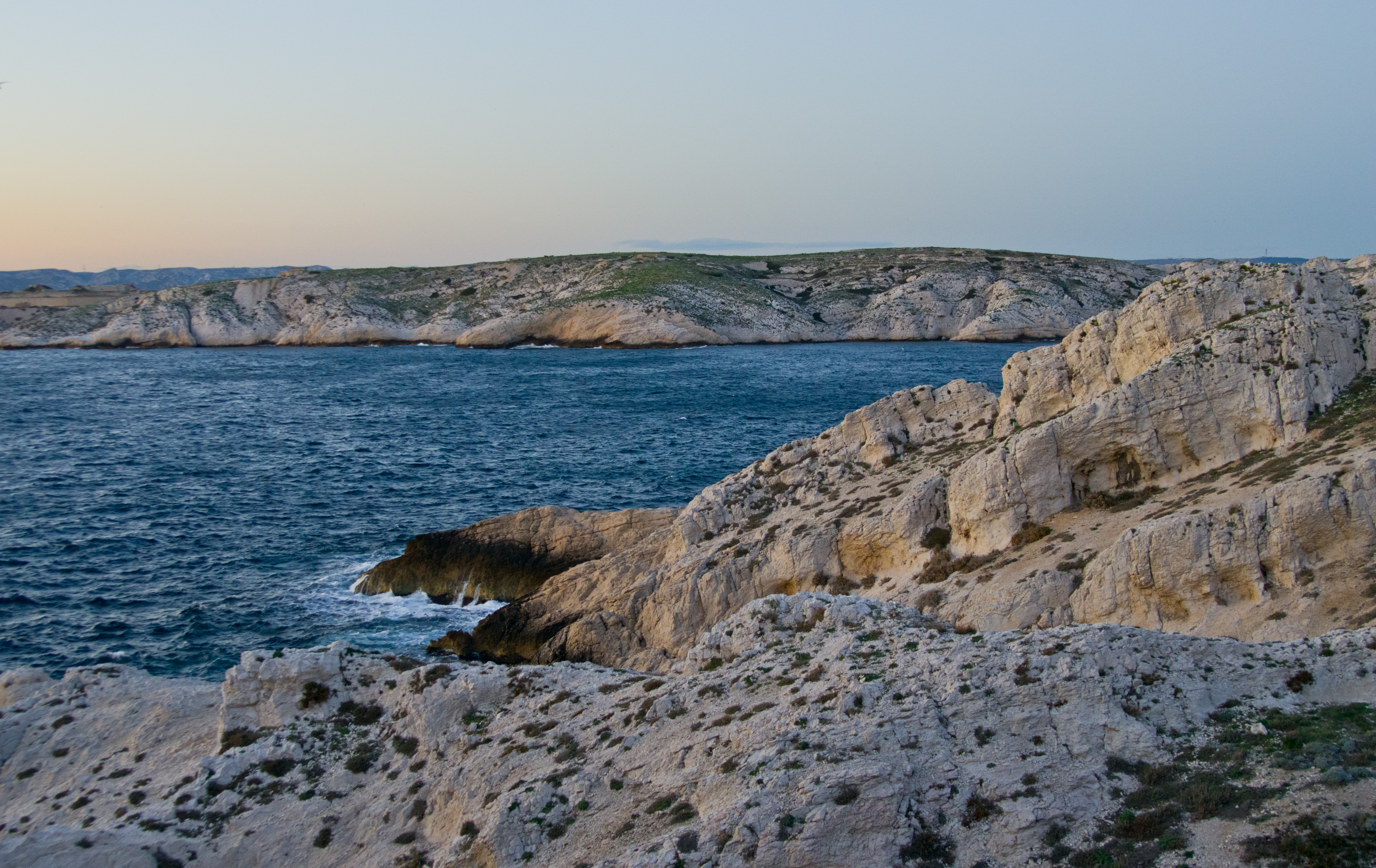 Iles du Frioul